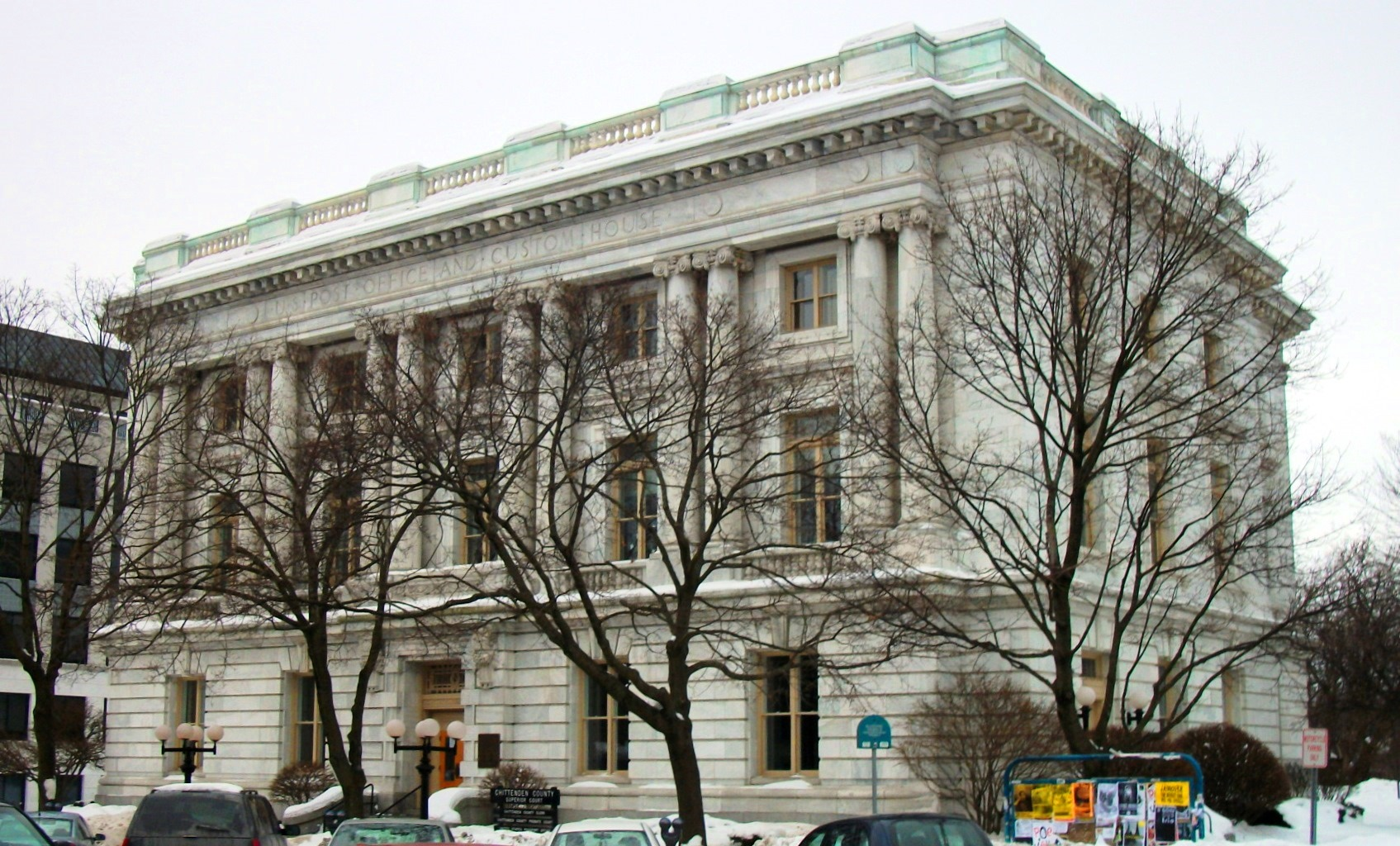 Burlington, Vermont